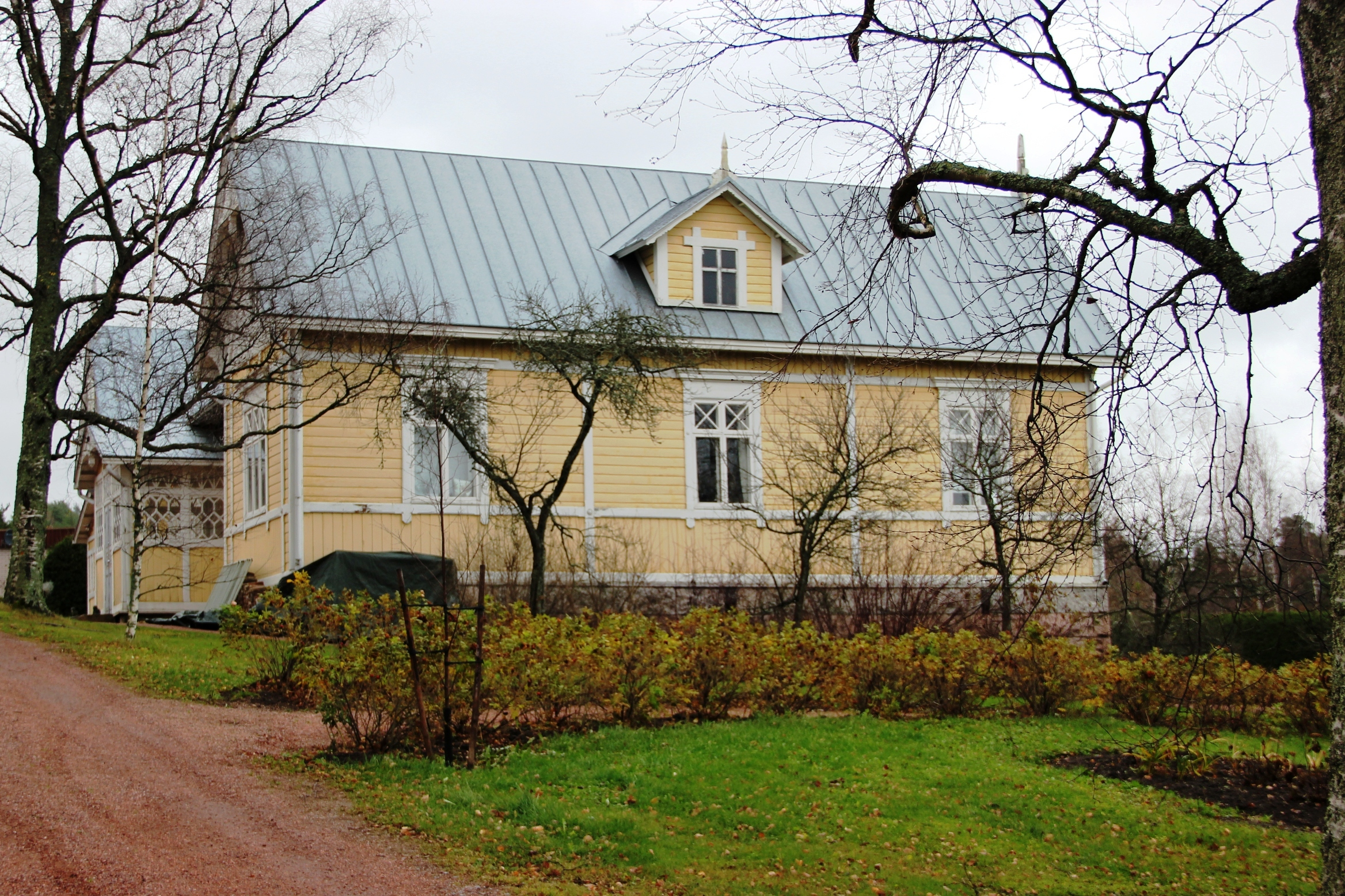 Rakennus yksityisomistuksessa asuinkäytössä